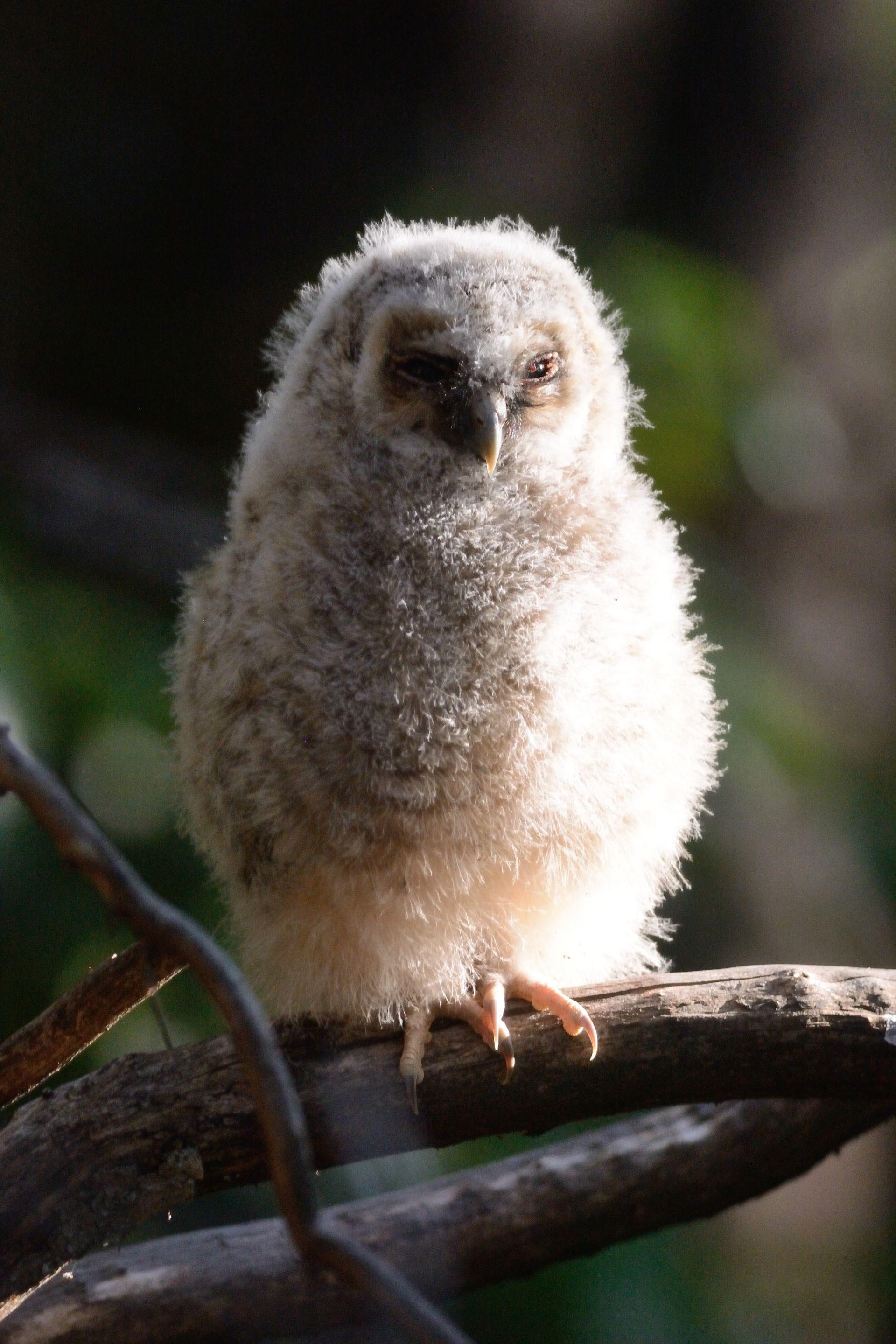 Concón polluelo, Valle las trancas 01ene17